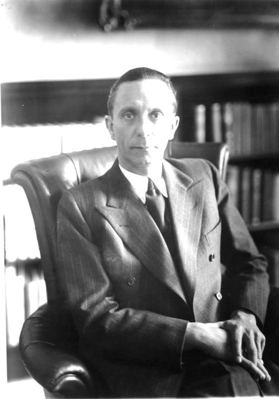 ADN-ZB/Archiv Joseph Goebbels, faschistischer Politiker und Hauptkriegsverbrecher, geb. 29.10.1897 in Rheydt, gest.(Selbstmord) 1.5.1945 in Berlin, u.a. Propagandaleiter der NSDAP, Reichspropagandaminister (seit 1933) und "Reichsbevollmächtigter für den totalen Kriegseinsatz" (seit 1944). [Aufnahme 1940]